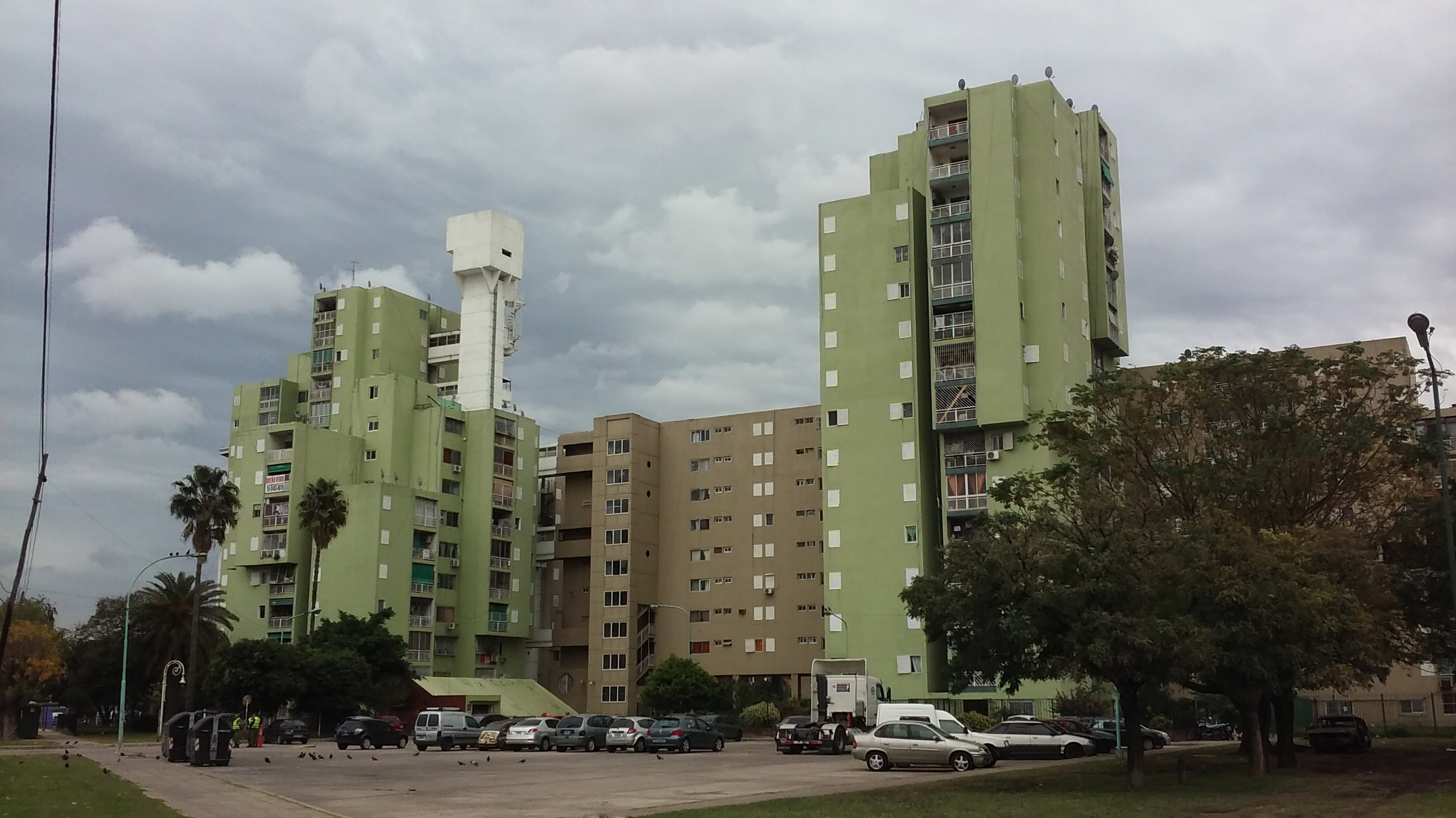 Edificios del conjunto urbano Soldati, en Av. Rabanal y Mariano Acosta.